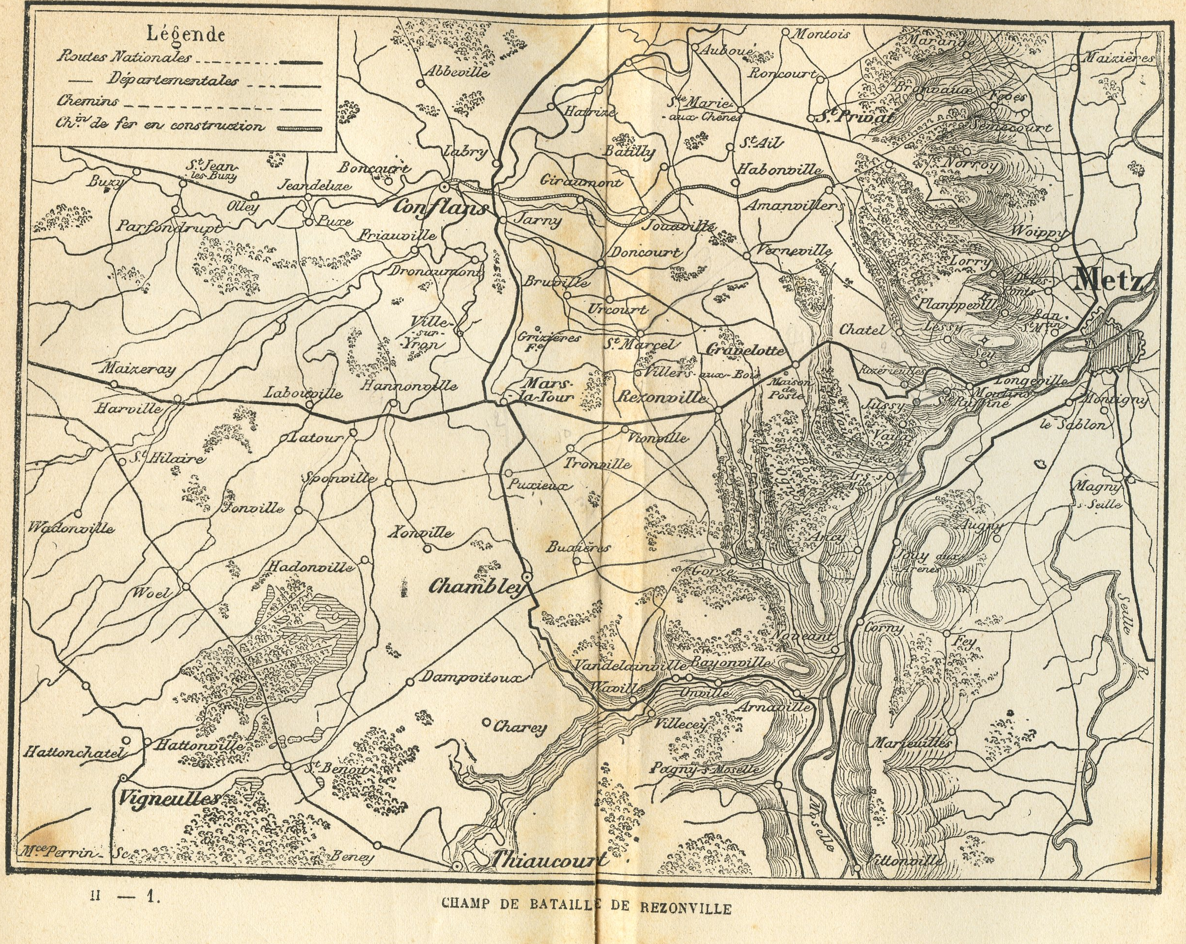 Carte du champ de bataille de Rézonville